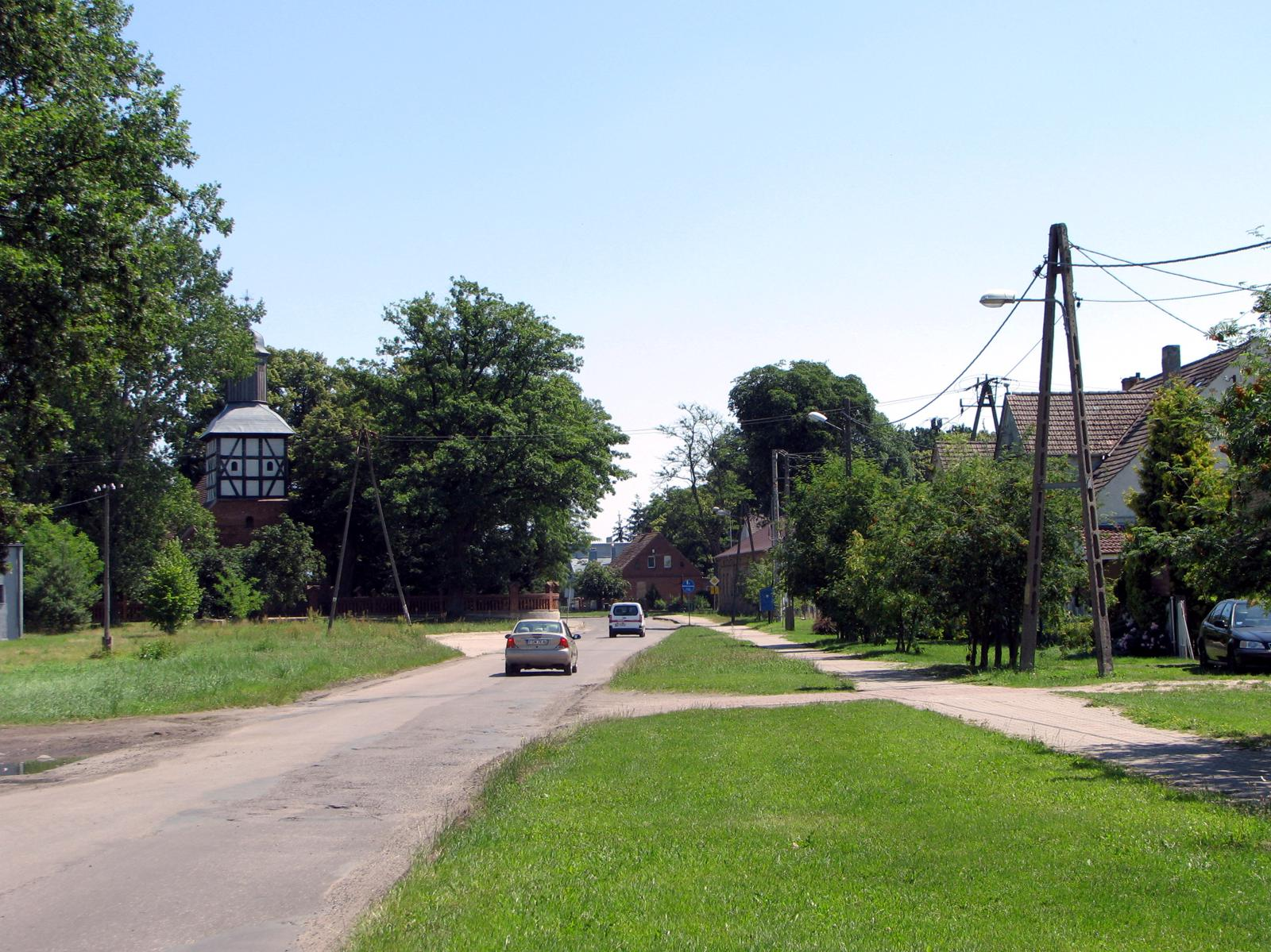 Wojcieszyce. Ulica Wspólna.